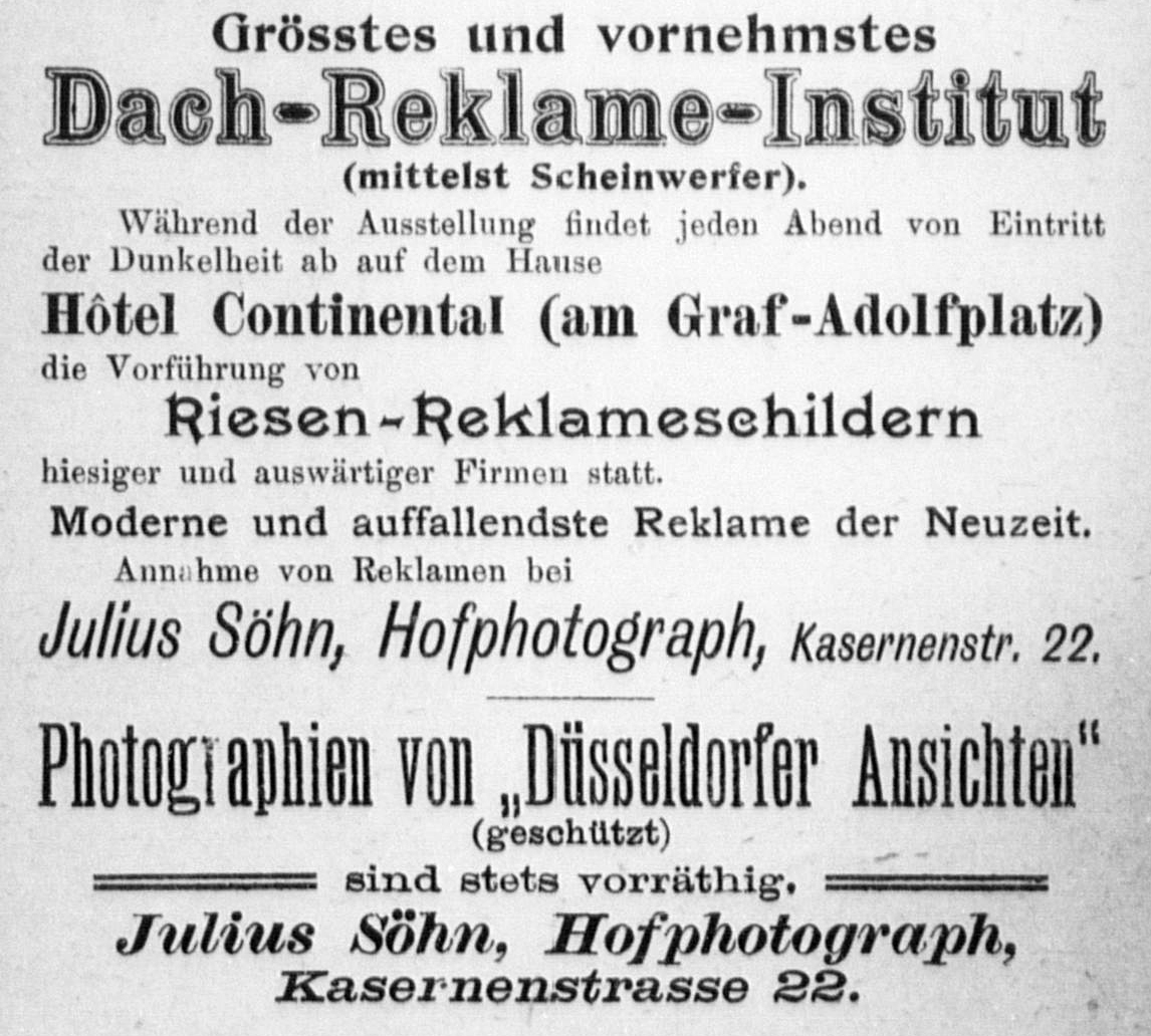 Inserat-Nr. 70: Julius Söhn, Hofphotograph und Dachreclameinstitut, Kasernenstraße 22, Düsseldorf, in Düsseldorfer Fremdenführer, Redemann & Ising, 1902